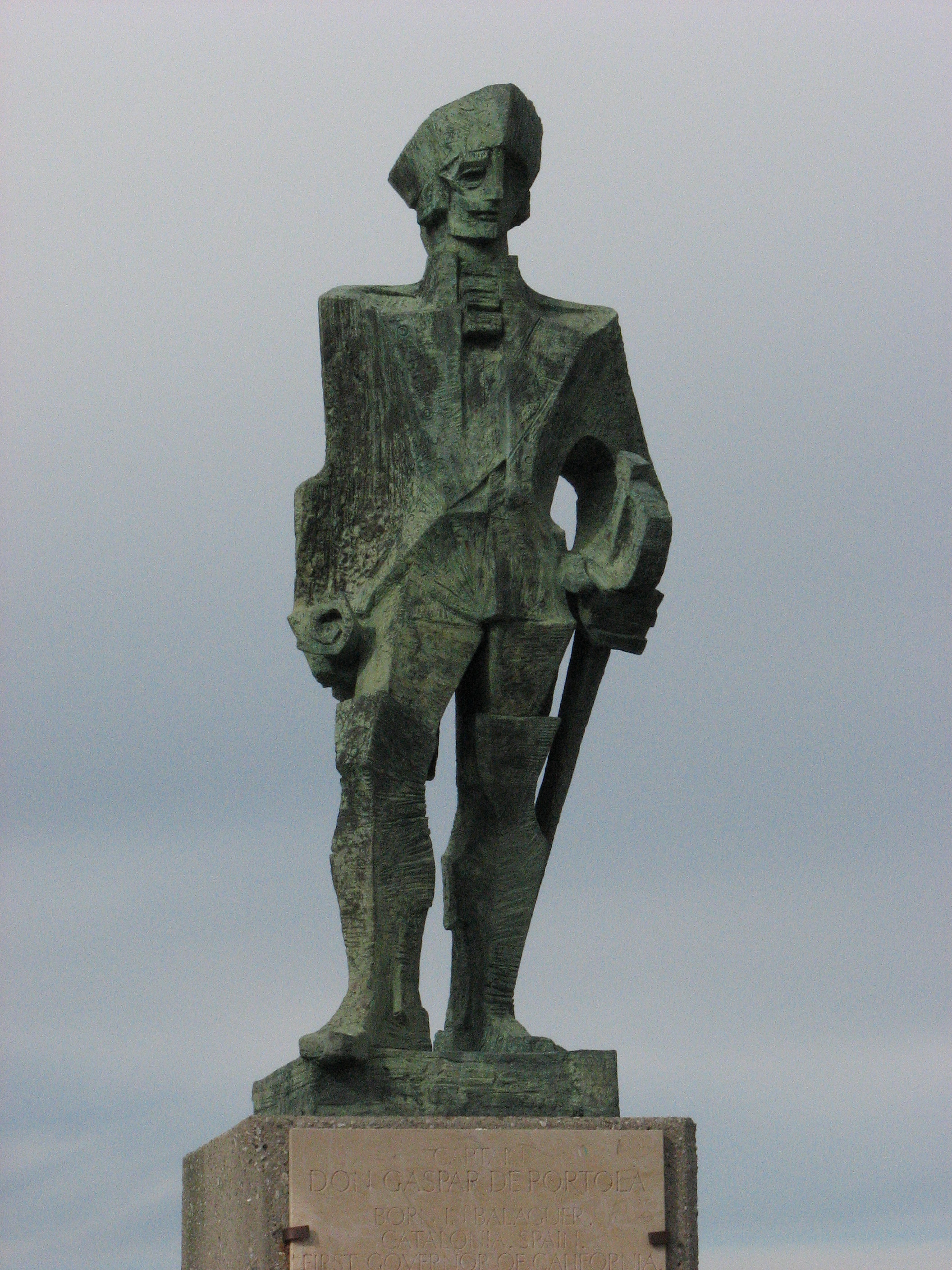 Statue of Gaspar de Portolà on Pacifica, California. Sculped by Josep Maria Subirachs and Francesc Carulla, it's 2'7 meters high and was donated to the State of California by Catalan Generalitat. Estàtua de Gaspar de Portolà a la ciutat de Pacífica, Califòrnia, actualment agermanada amb Balaguer. Va ser esculpida per l'artista català Josep Maria Subirachs i Francesc Carulla i donada a l'Estat de Califòrnia per la Generalitat de Catalunya el 1988.